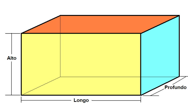 La artikolo estis verkita de mi surbaze de la anglalingva versio, kiu jam estis publika havaĵo (kun sama ŝablono kiel ĉi tiu de mi tradukita versio).